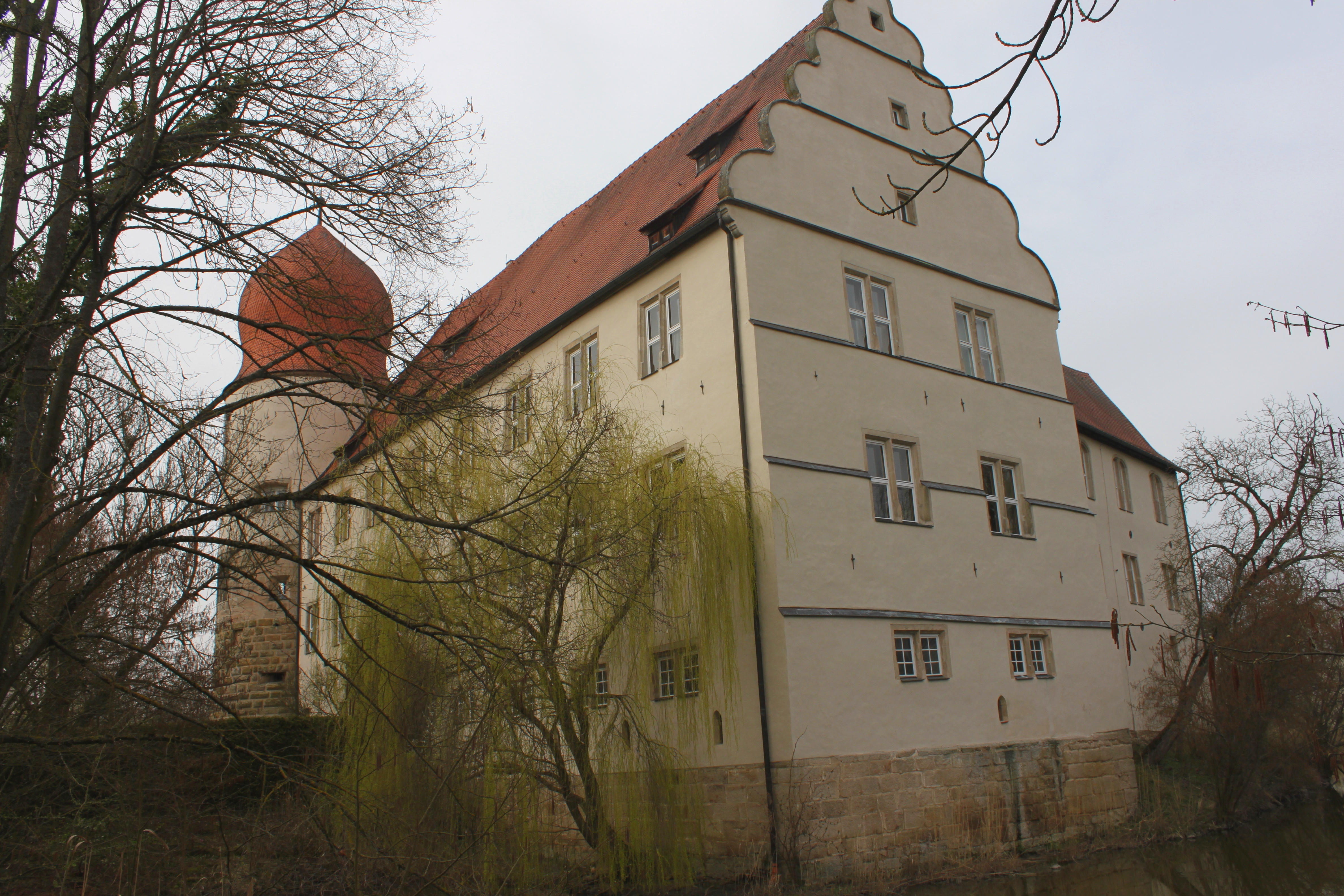 Wasserschloss, Schlossstraße 24, Neuhaus, Adelsdorf, Baudenkmal D-5-72-111-34